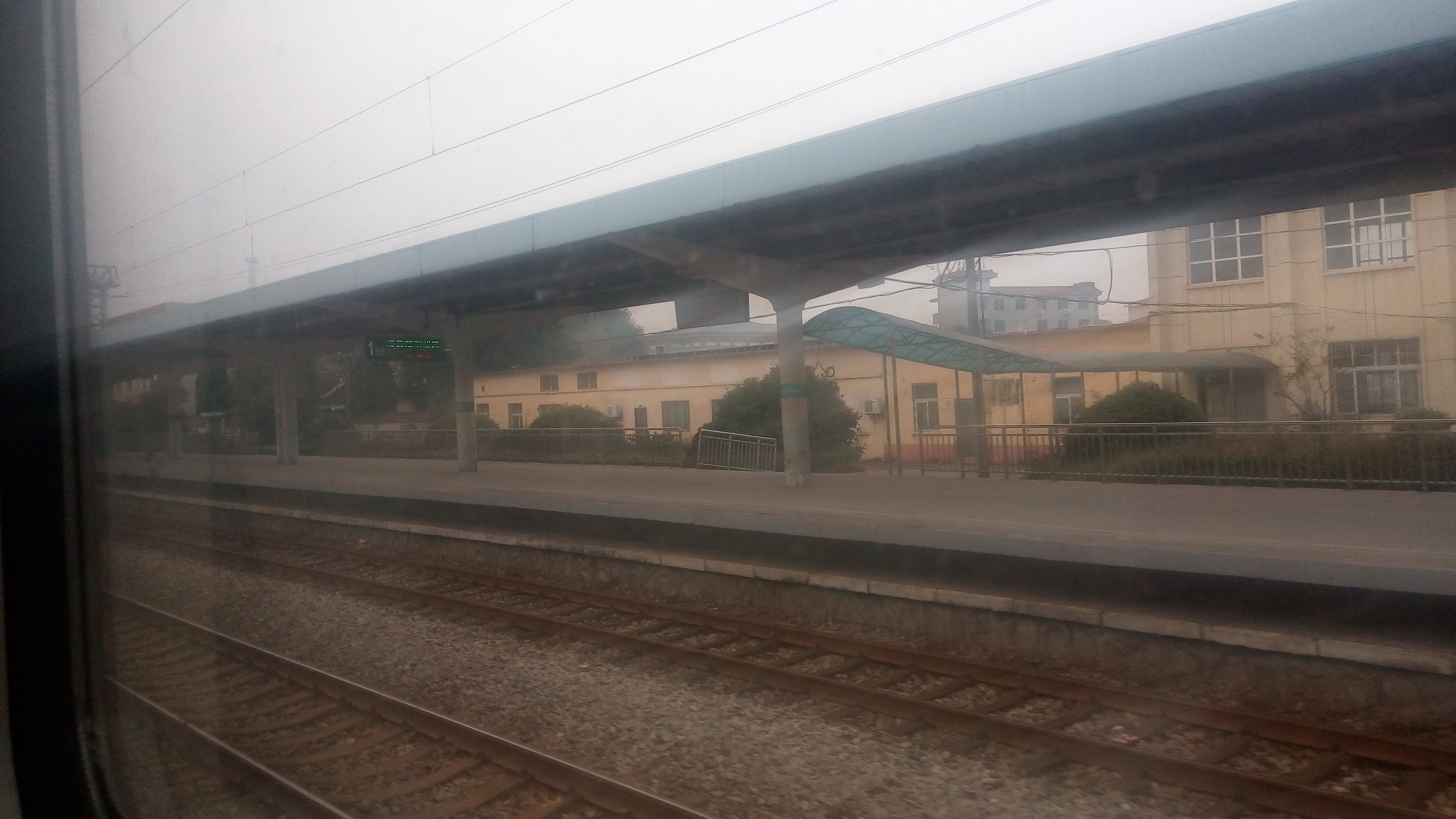 瑞昌站1站台 左庐山方向